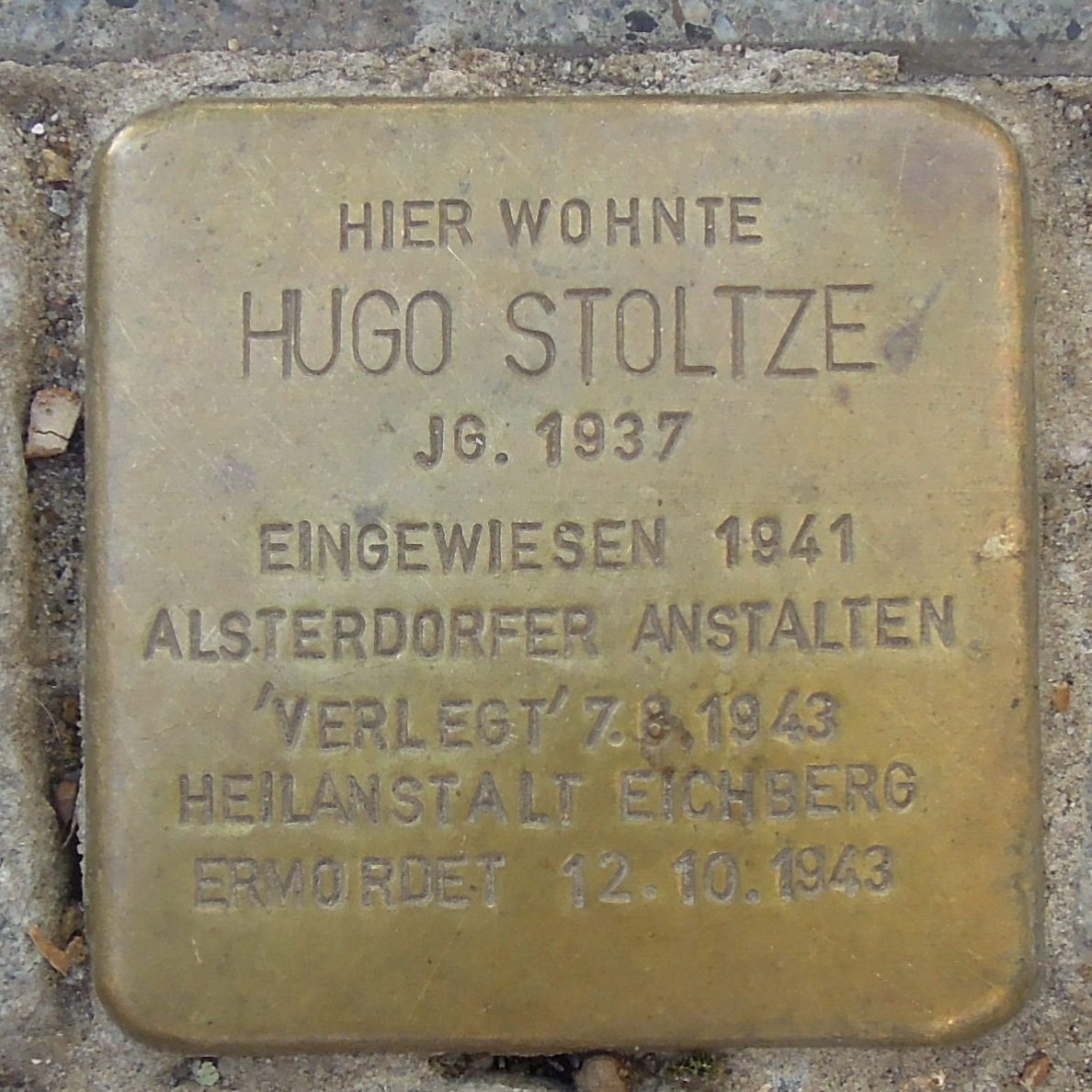 Stolperstein Hugo Stoltze